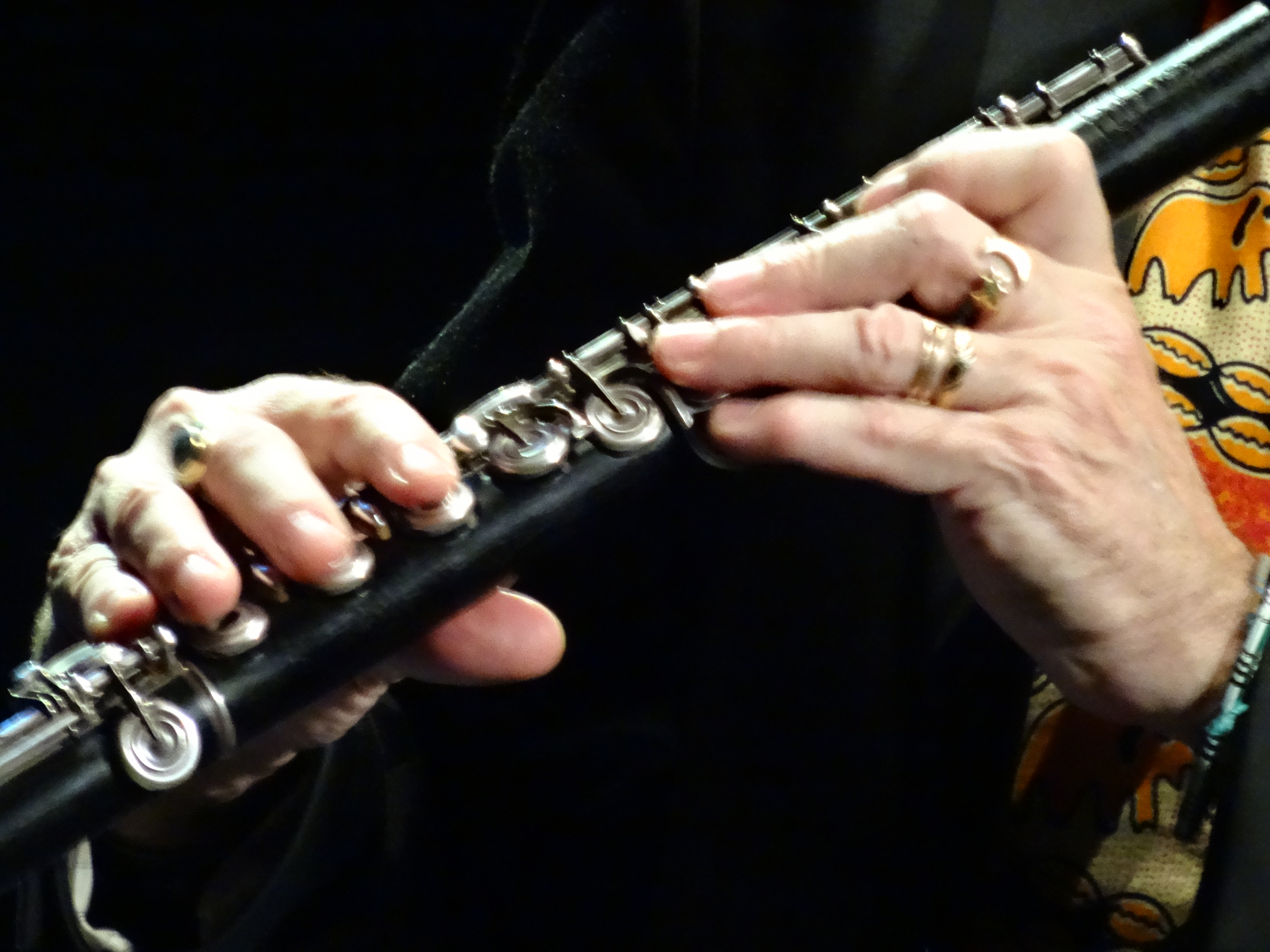 Detalle del concierto de Jorge Pardo en el Festival de Jazz de San Javier, 2017